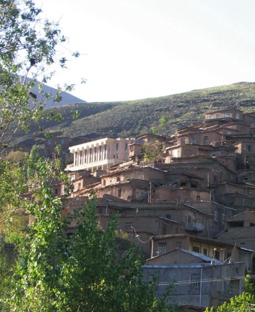 Jamatkhana in Dizbad-near Nishapur City.جماعت خانه دیزباد نیشابور